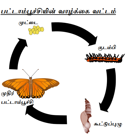 பட்டாம்பூச்சியின் வாழ்க்கை வட்டம்